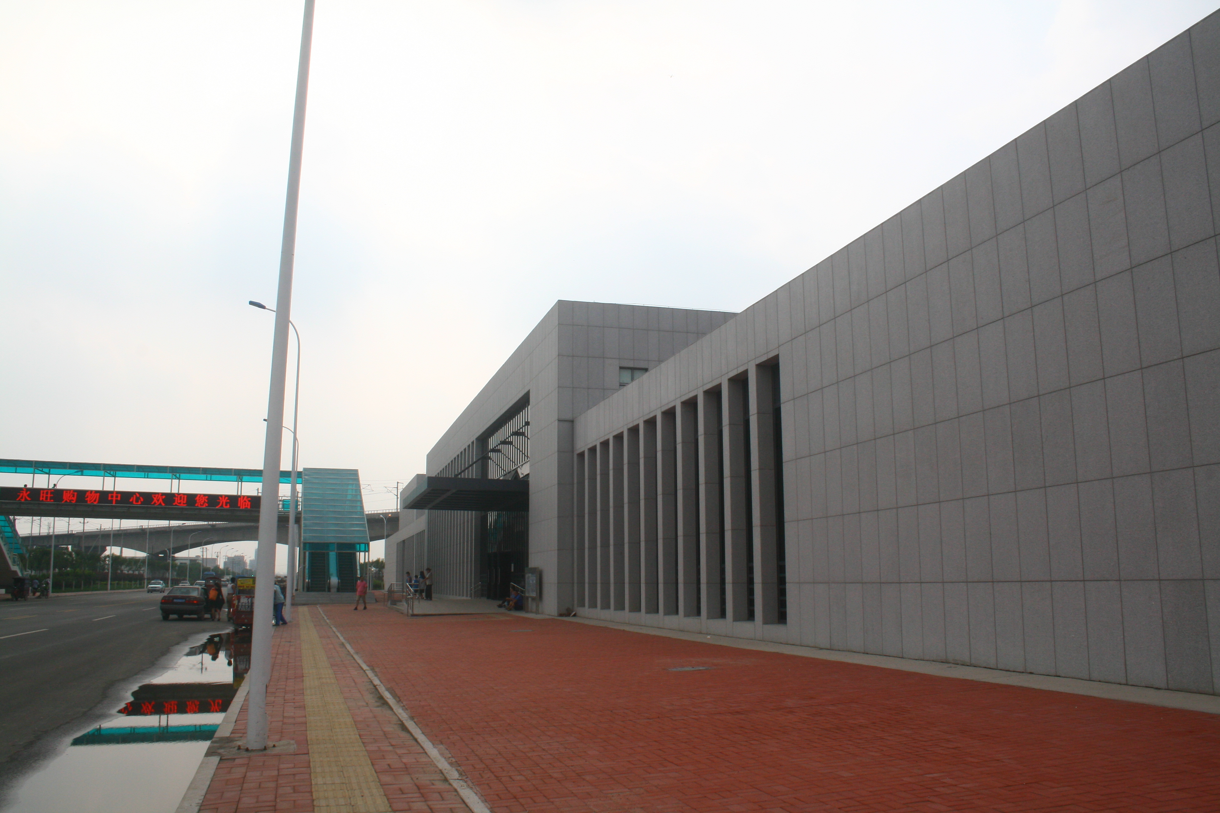 曹庄站站體